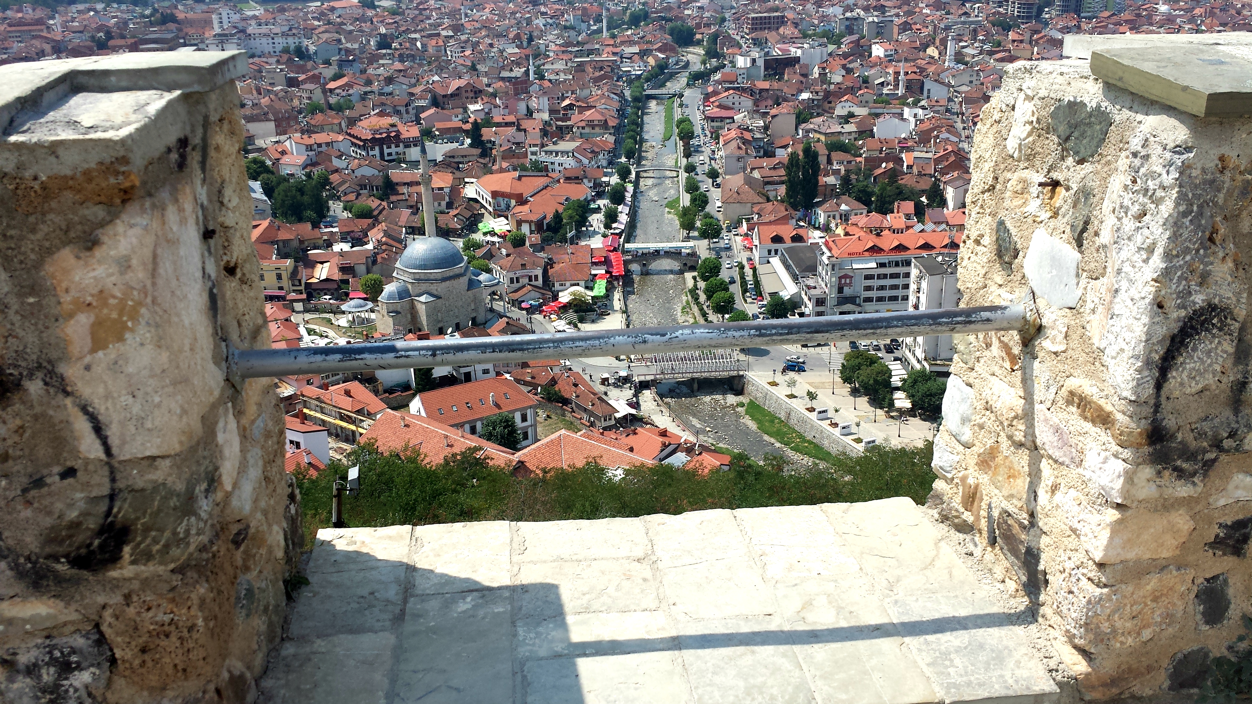 Kalaja e Prizrenit